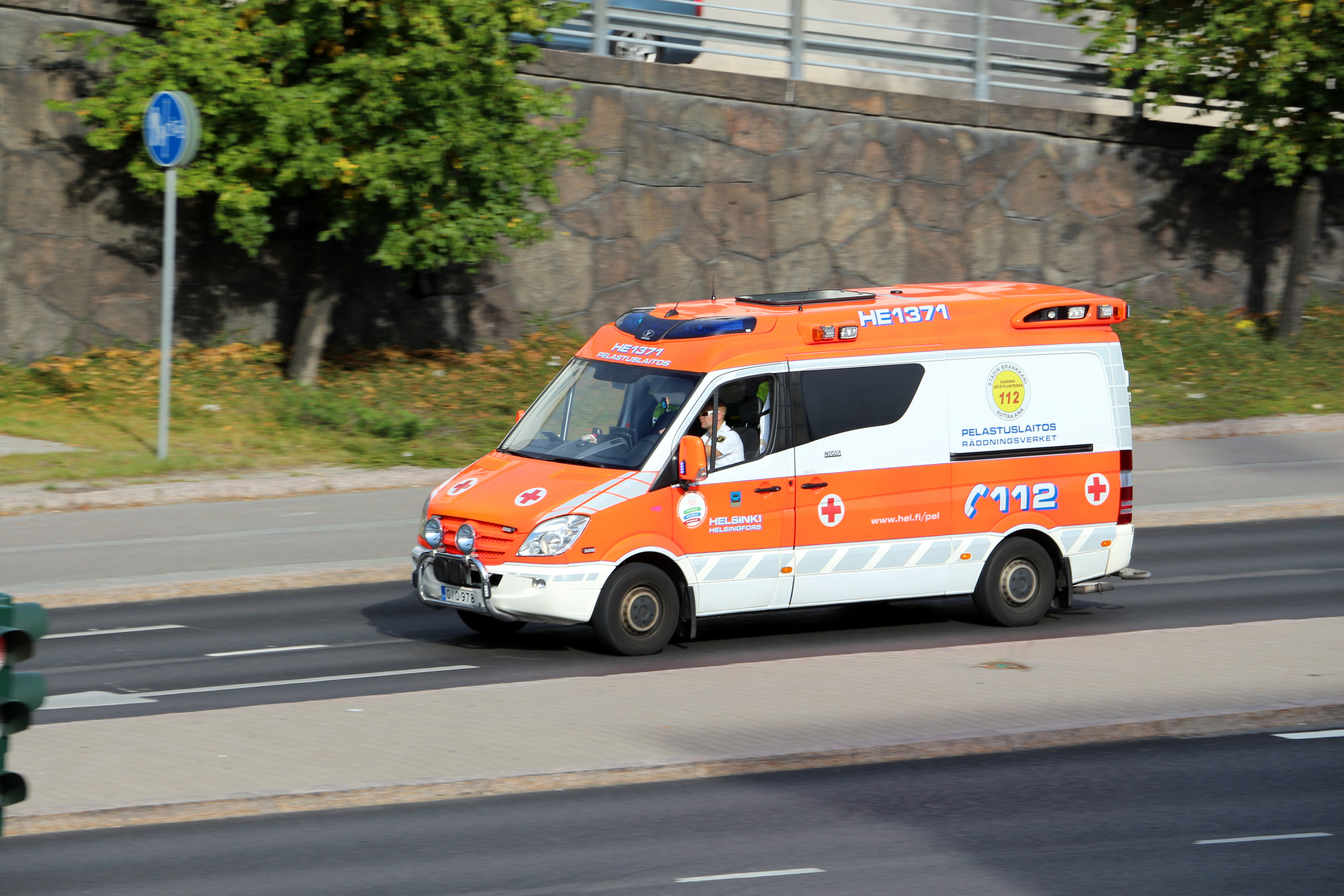 Helsinki ambulance